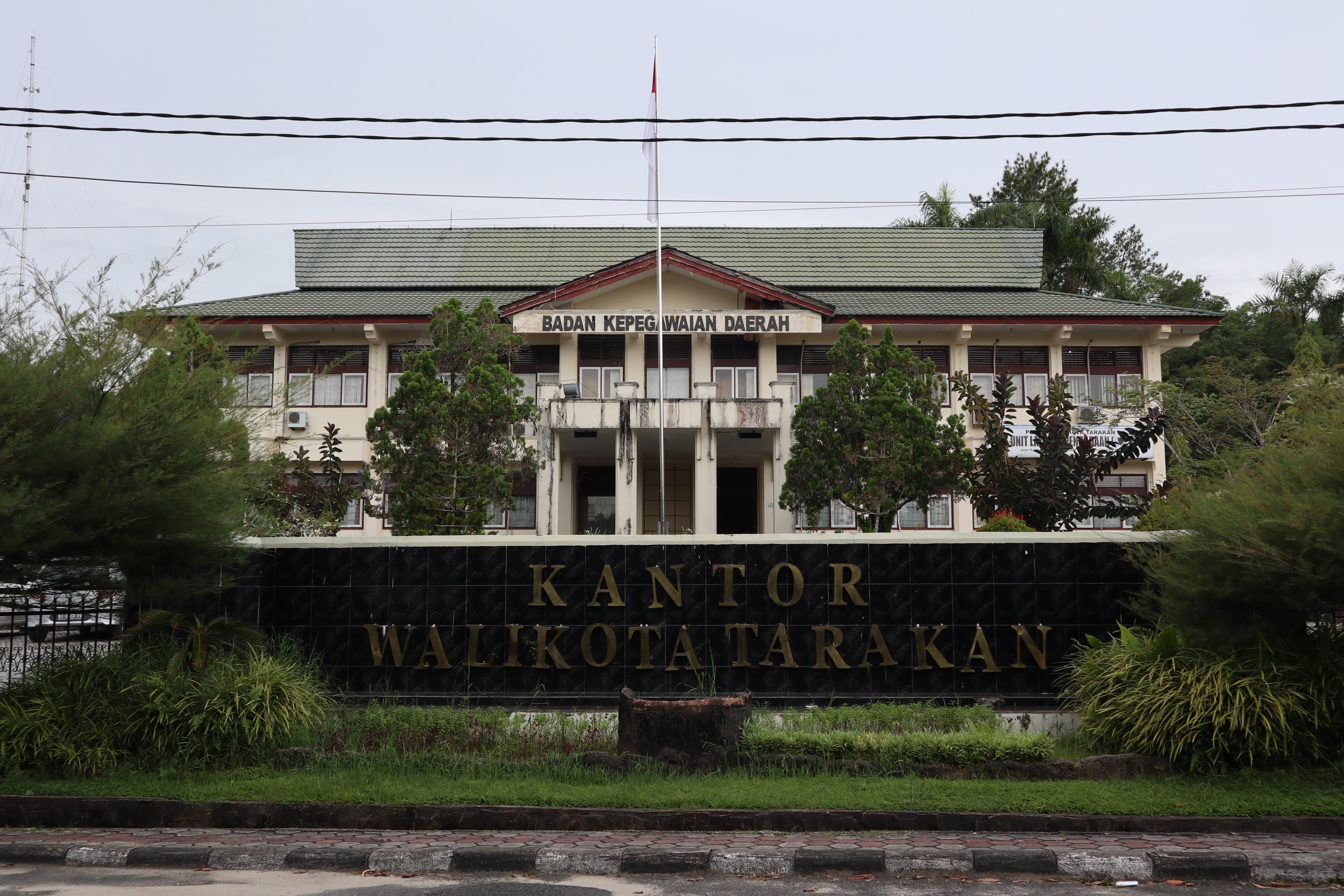 Kantor Wali Kota Tarakan.